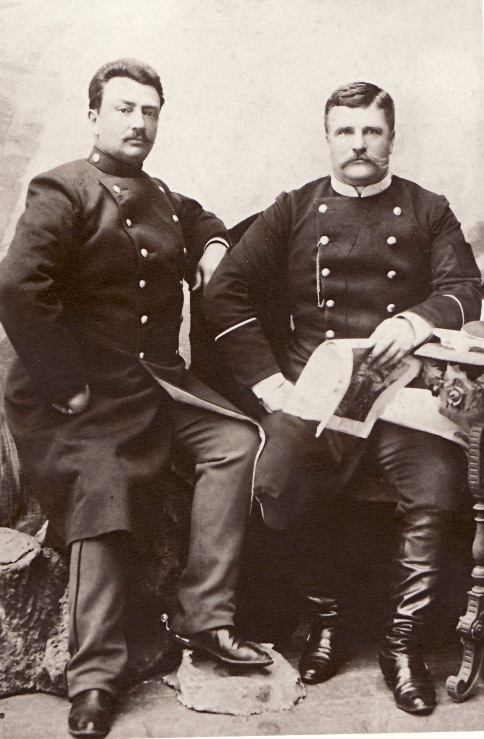 Брати Кароль та Казимир Сцібор- Мархоцькі. Фото к. 19 ст.